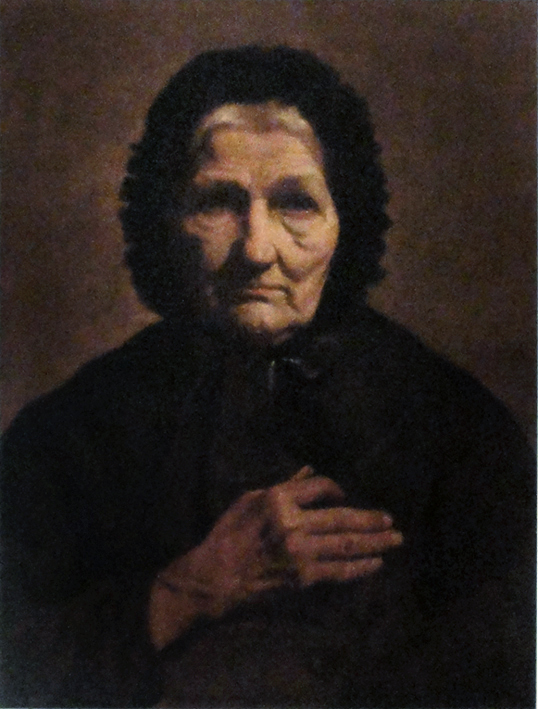 Retrato de Angélica Weingärtner (mãe do pintor), óleo sobre madeira, 60 x 44cm